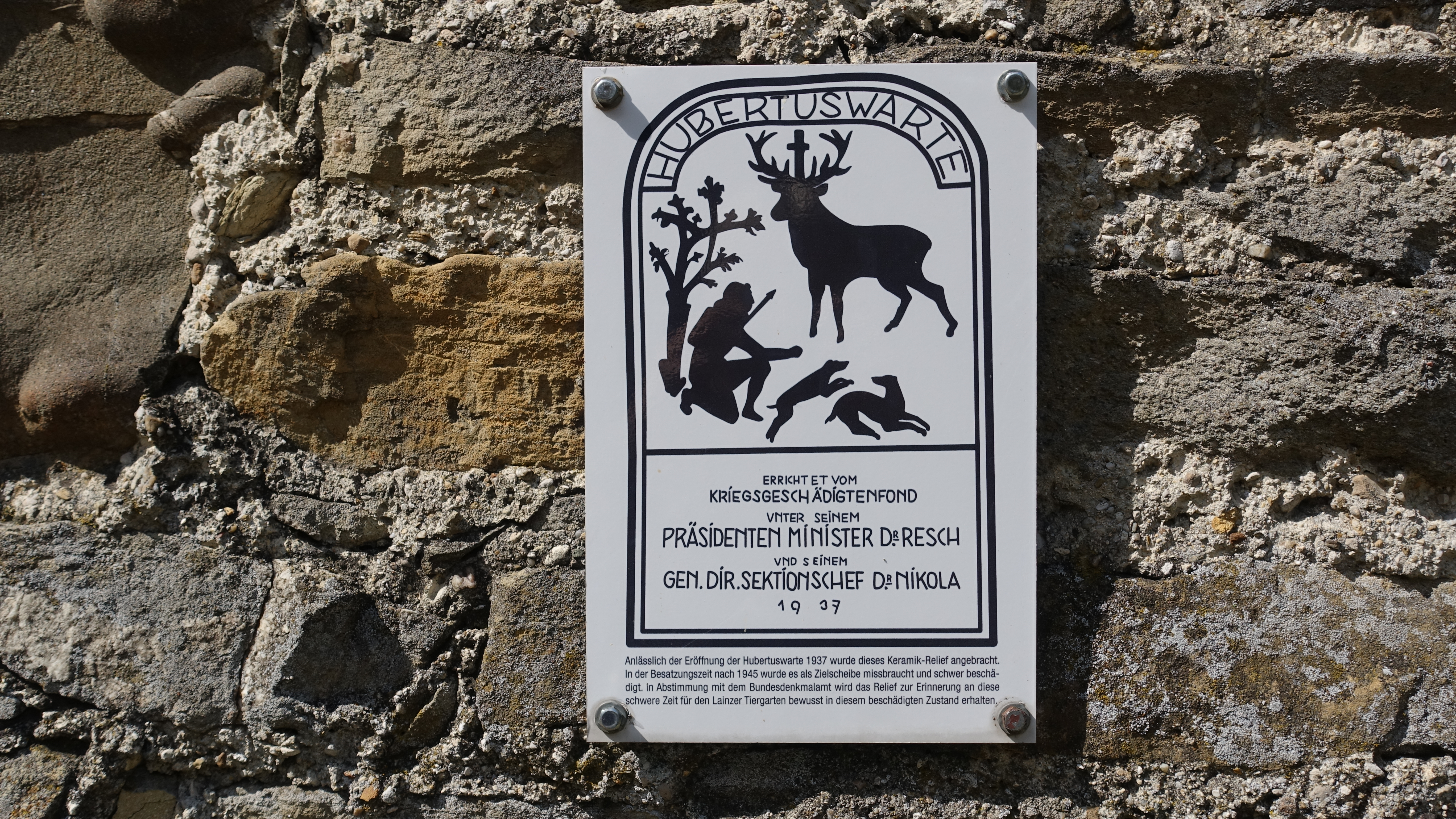 Wien - Sept. 2019 - Hubertuswarte